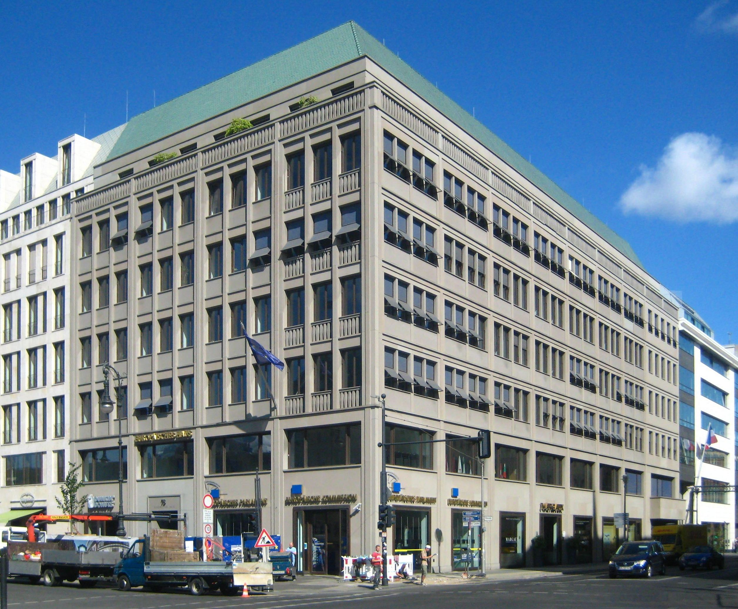 Das Europäische Haus, Unter den Linden 78, Ecke Wilhelmstraße (rechts), in Berlin-Mitte - Sitz der Vertretung der Europäischen Kommission in Deutschland mit Informationsbüro. Das Geschäfts- und Wohnhaus wurde 1997-1999 nach einem Entwurf des Architekten Hans Kollhoff erbaut.